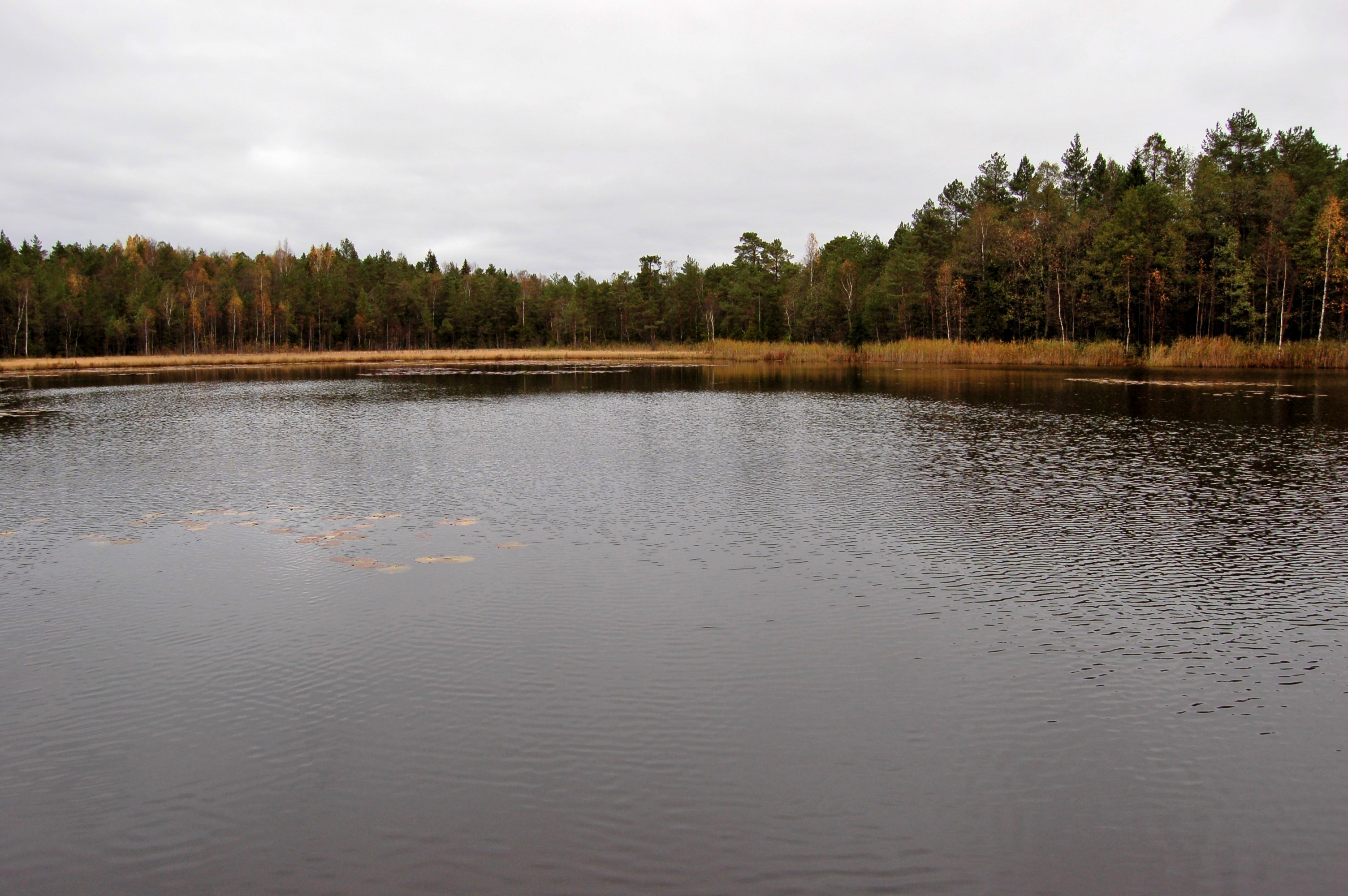 Suur kalajärv